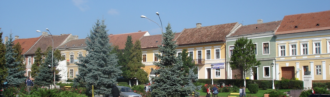 Orăştie, case în Piaţa Catedralei, fotografiate septembrie 2007